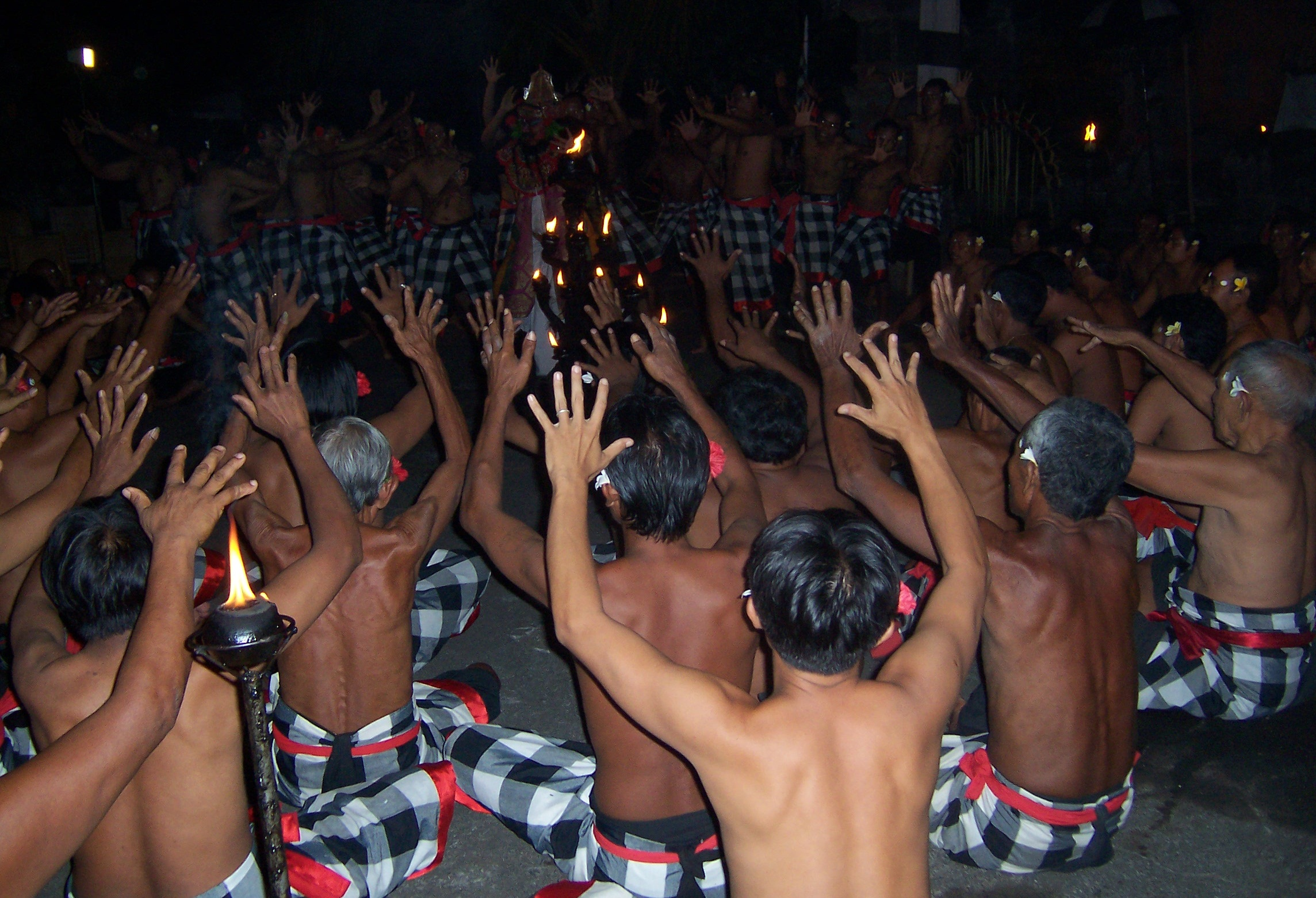 Танец кечак на Бали